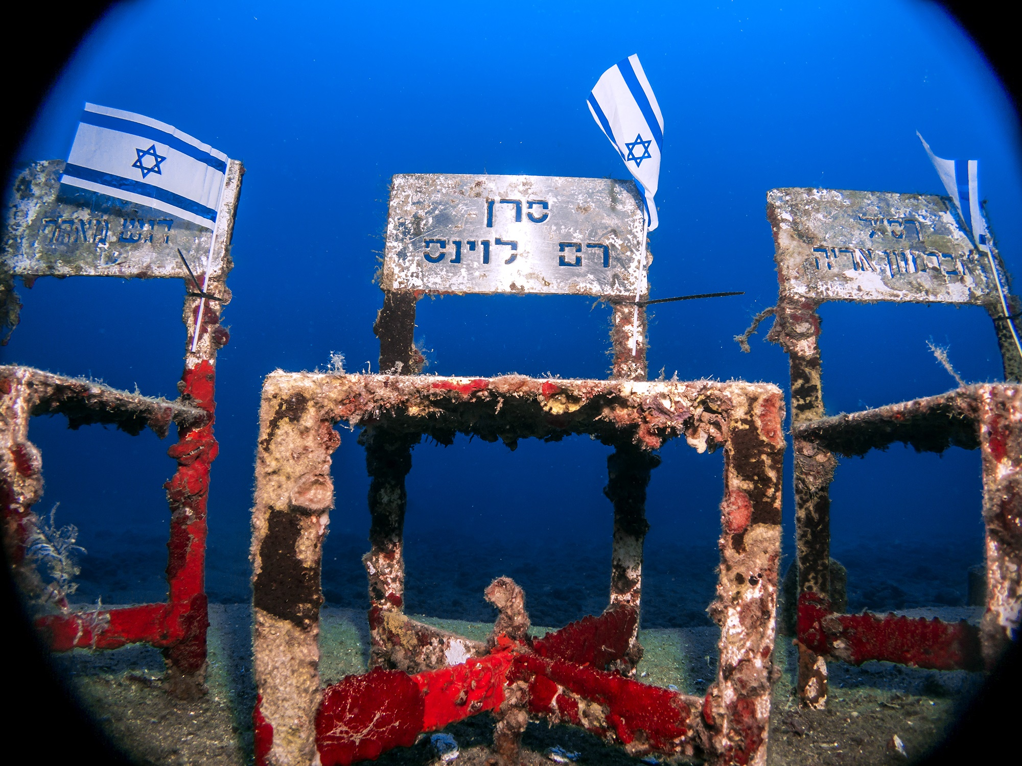 אנדרטת חללי אסון השייטת מבט מקרוב